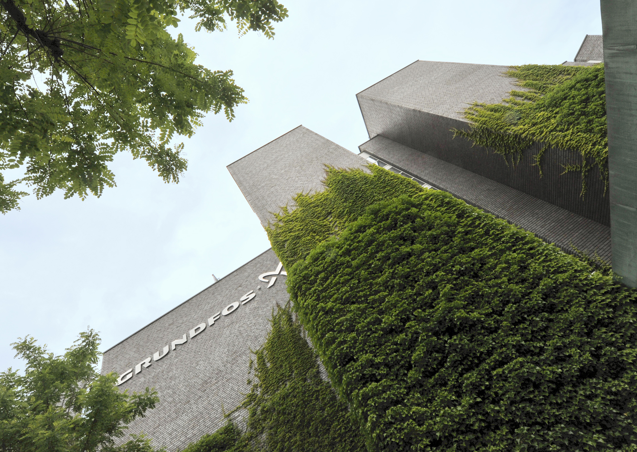 12. Station der Zukunftsenergientour: Grundfos GmbH Erkrath Auf der 12. Station seiner Zukunftsenergien-Tour informierte sich NRW-Klimaschutzminister Johannes Remmel am 26. Juni 2013 mit einer Delegation der EnergieAgentur.NRW beim Erkrather Unternehmen Grundfos über energiesparende Heizungspumpen. Flickr tags: Zukunftsenergien-Tour; Johannes Remmel; NRW; Erkrath; Heizungspumpen